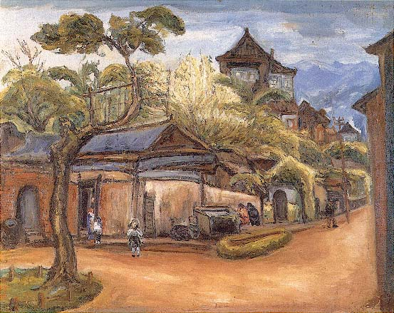 此畫的地點在嘉義市安樂街１０２號「黃宅」的洋樓附近。雖然彎曲的大街是陳氏畫中常見的主題，但此幅氣氛空蕩游移，或與畫題有關。左側的行道樹造型古拙，有如刻意培養的盆栽，面對觀者的小女孩面無表情，獨自站在馬路的轉折點附近，雖然行人三三兩兩，但彼此甚少關聯，空曠的街道特別顯眼，遠處的玉山呈淡淡的寶藍色，全幅帶有神秘氣息。(by 李賢輝)